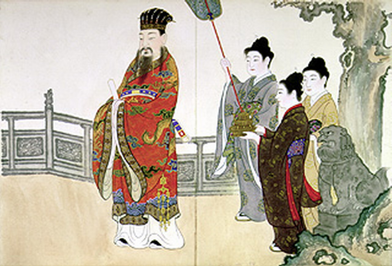 王府時代の国王から一般庶民までの姿